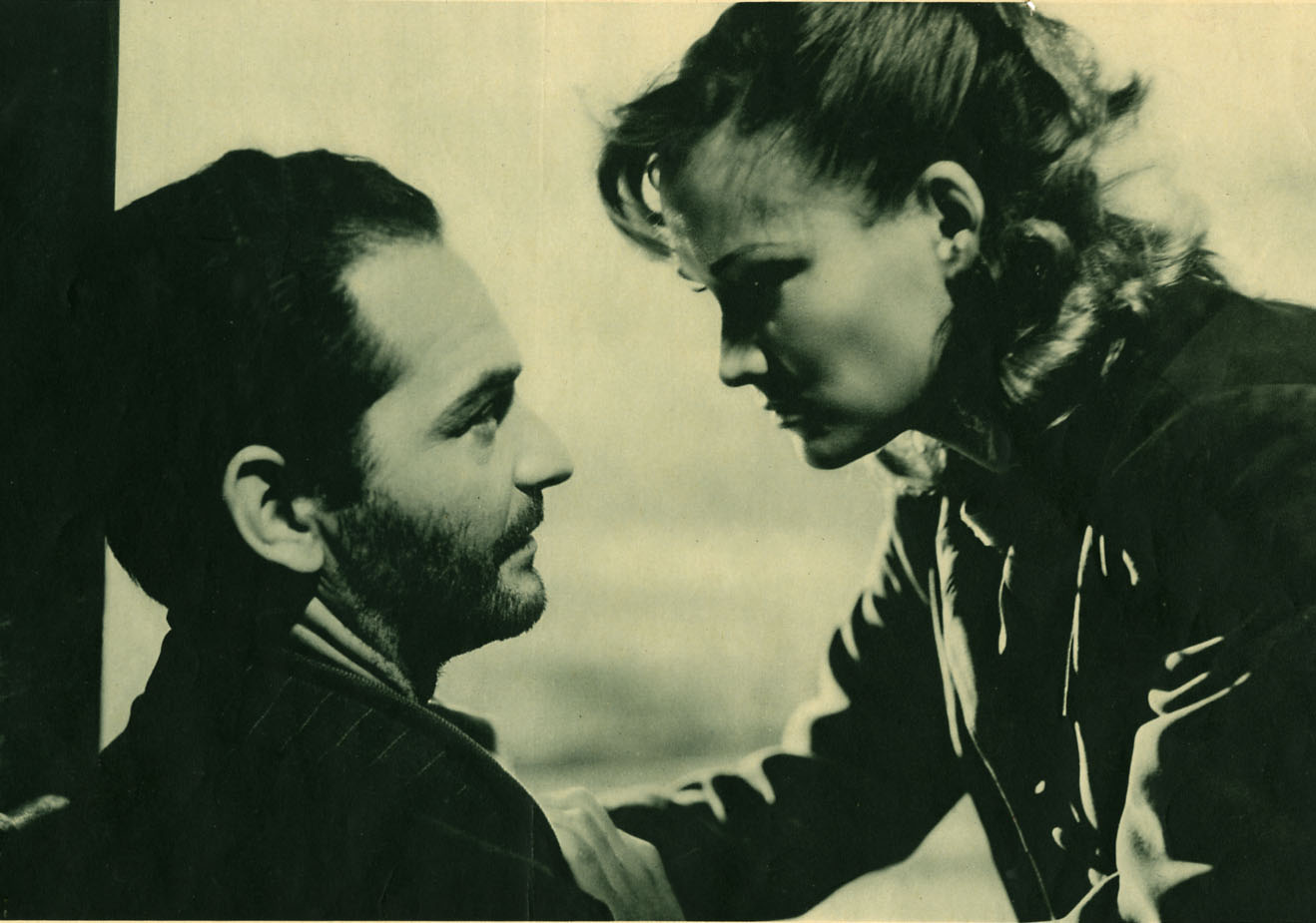 Andrea Checchi e Costance Dowling nel film La strada finisce sul fiume (1951).